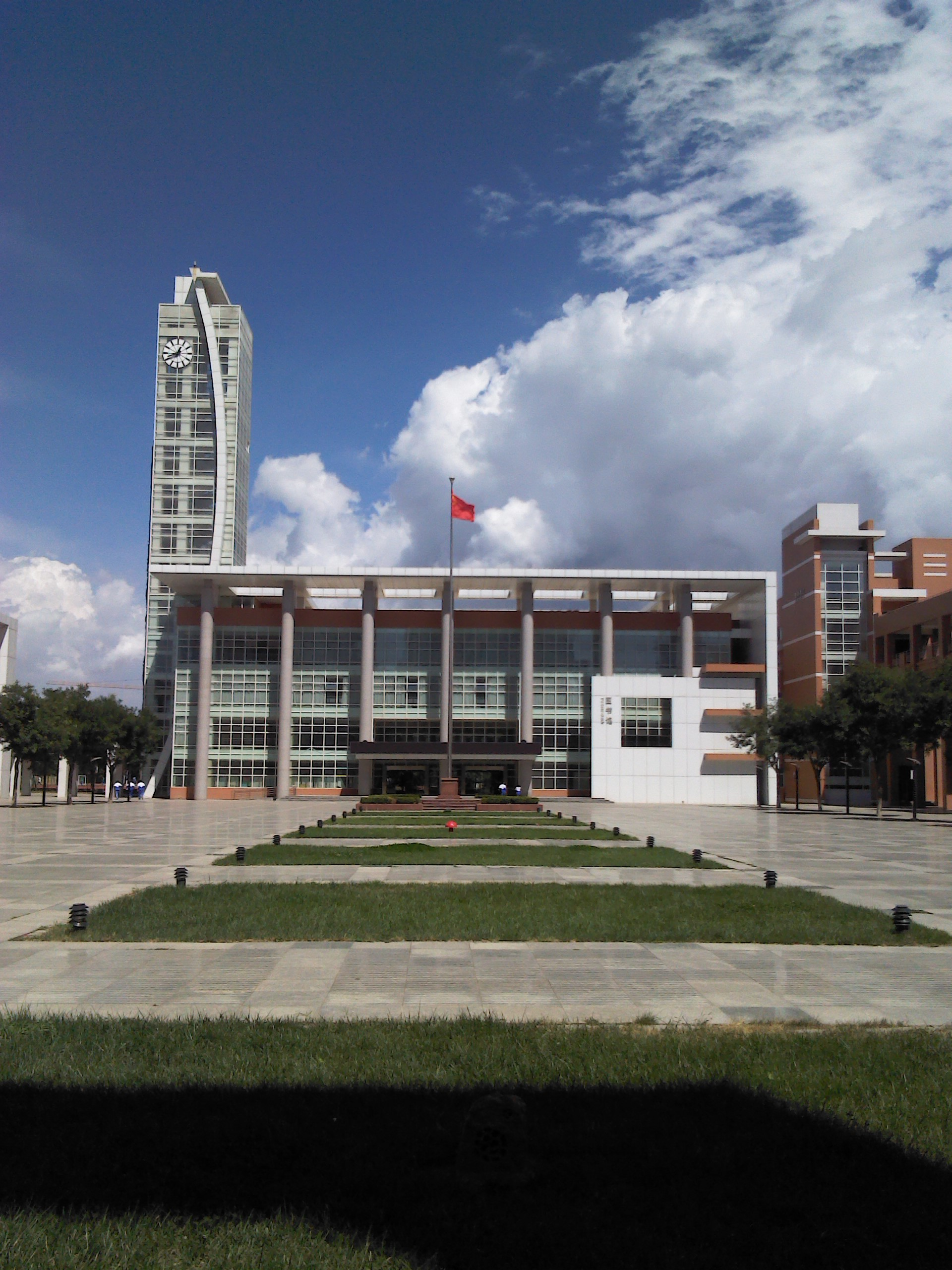 银川二中图书馆